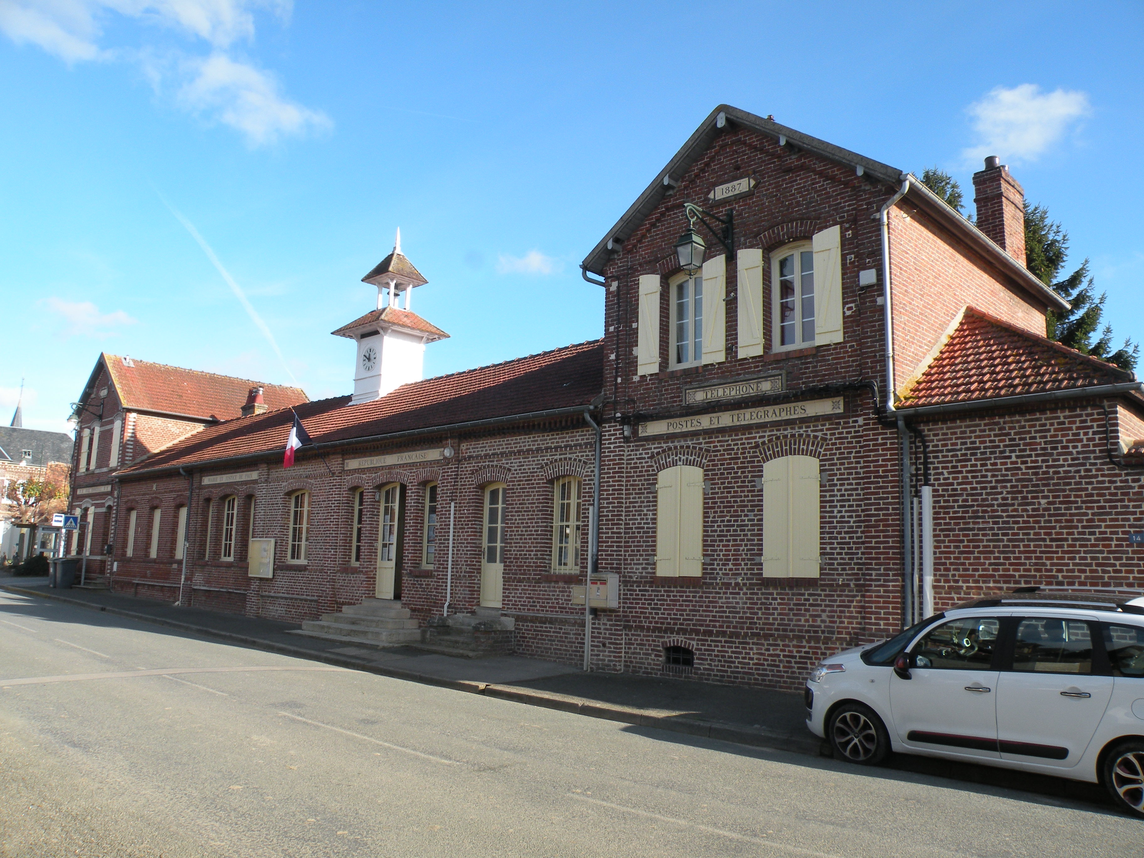 Nivillers